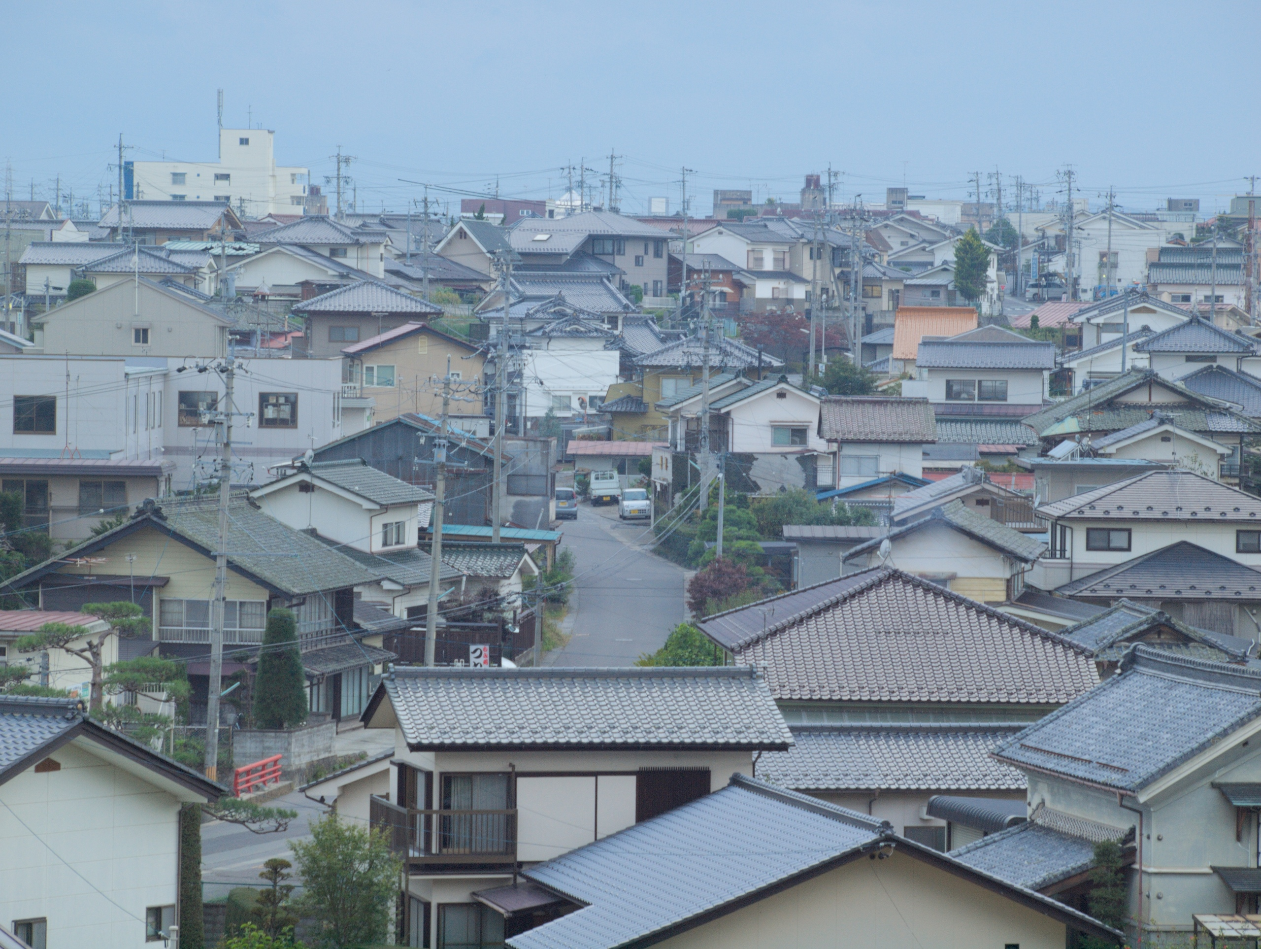 Iwamurada, Saku, Nagano Prefecture 385-0022, Japan